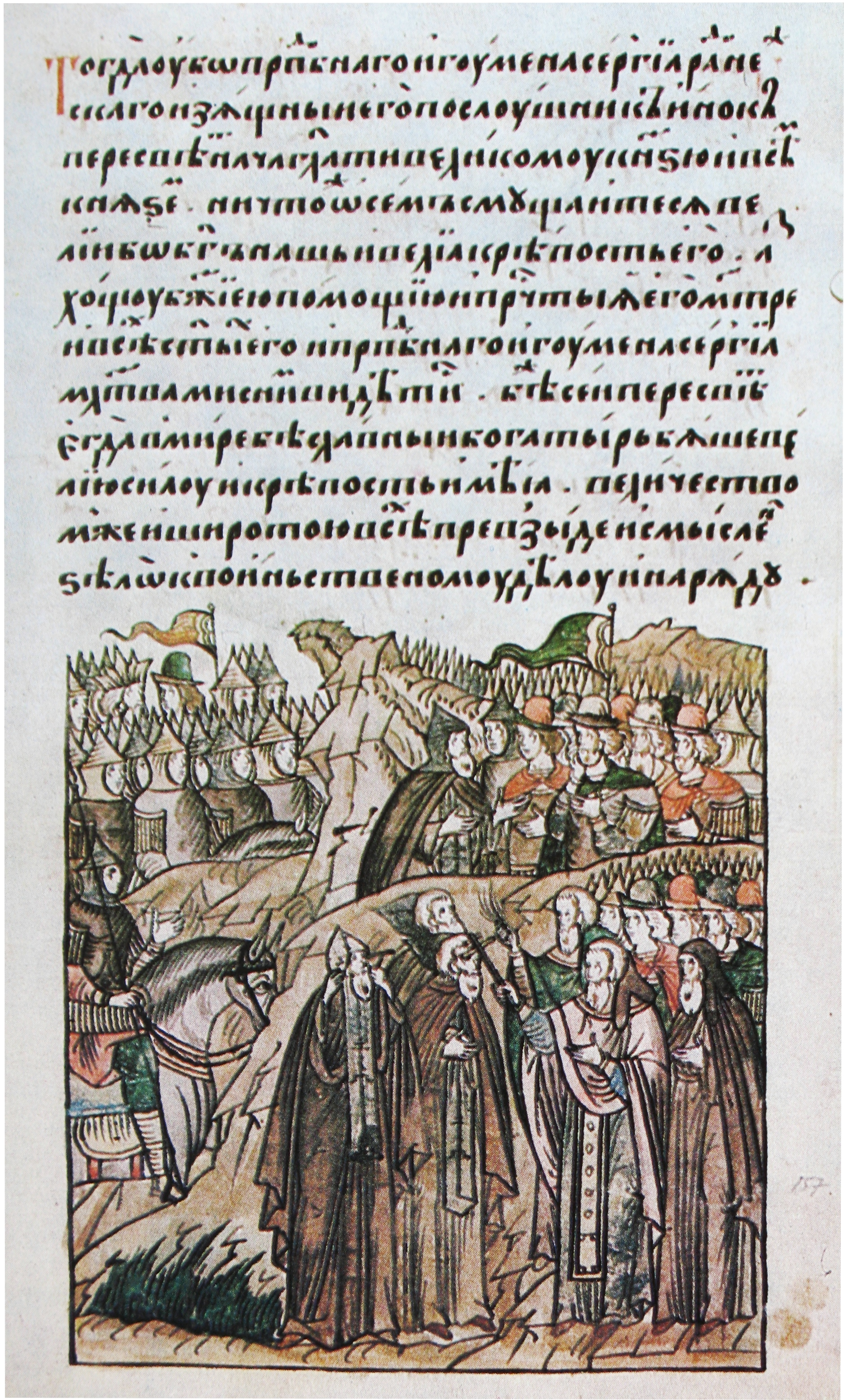 Миниатюра "Сергий Радонежский благословляет Пересвета перед Мамаевым побоищем": страница Лицевого летописного свода Иоанна Грозного. Вторая половина 16 века. «Тогда же преподобного игумена Сергия Радонежского изящный его послушник инок Пересвет начал говорить великому князю и всем князям: „Нисколько о не сем смущайтесь, велик Бог наш и великая крепость от него. Я хочу Божиею помощию, и пречистой его матери, и всех святых его, и преподобного игумена Сергия молитвами с ним встретиться“. Был же сей Пересвет, когда в мире был, славный богатырь, великую силу и крепость имел, ростом и широтою плеч всех превосходил, и смышлен был весьма к воинскому делу» (Татищев. История Российская).